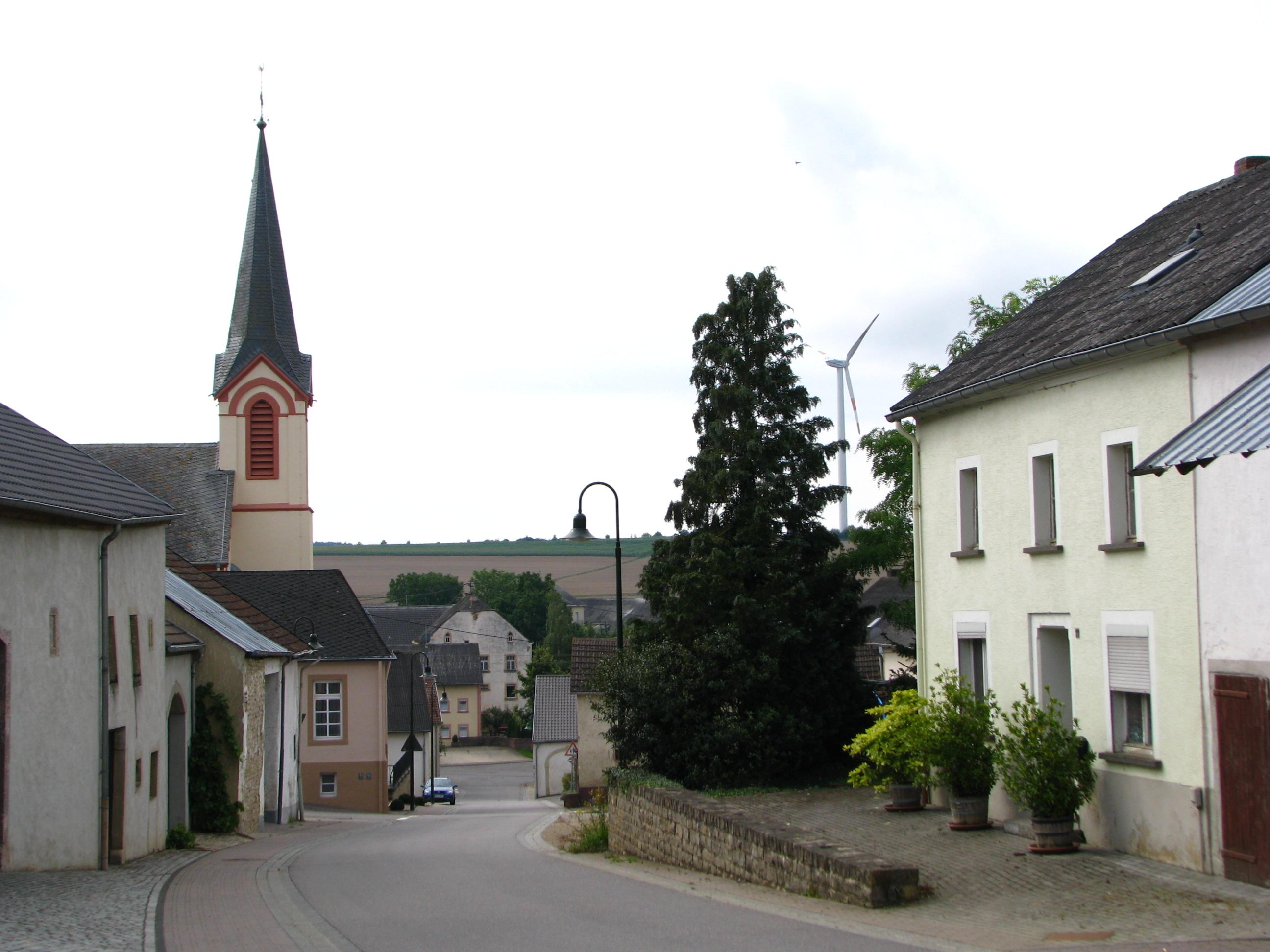 Eisenach (Eifel), Dorfzentrum mit Kirche, im Hintergrund Windkraftanlage.